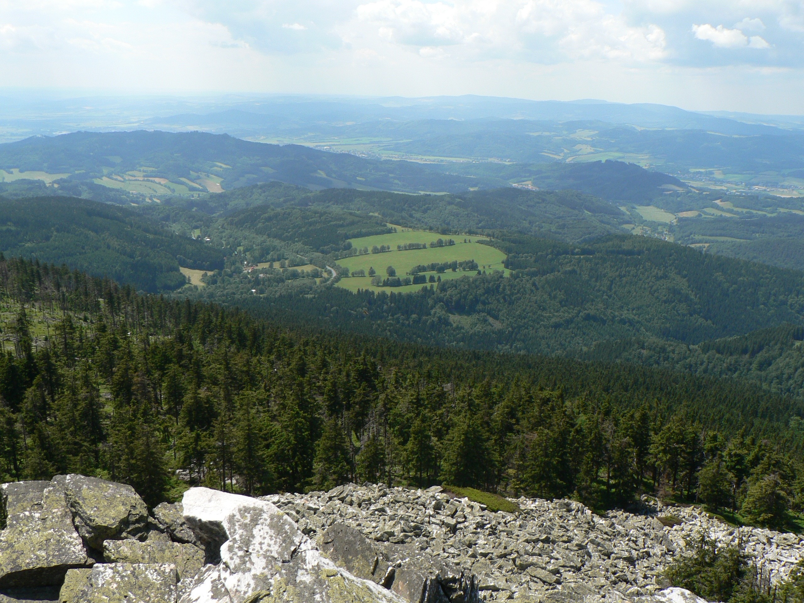 Výhled ze Ztraceným kamenů na Šumpersko